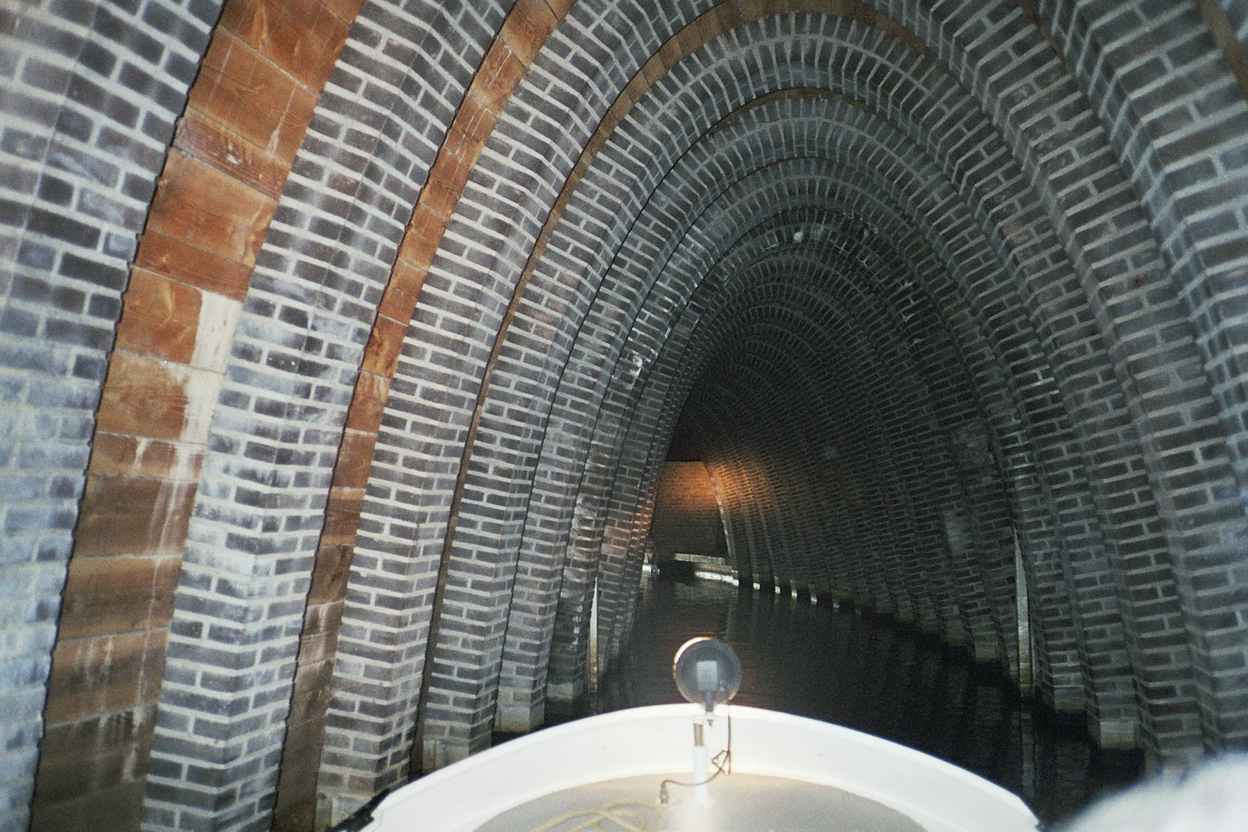 Binnendieze, het gedeelte van de rivier de Dieze binnen de muren van de binnenstad van 's-Hertogenbosch.